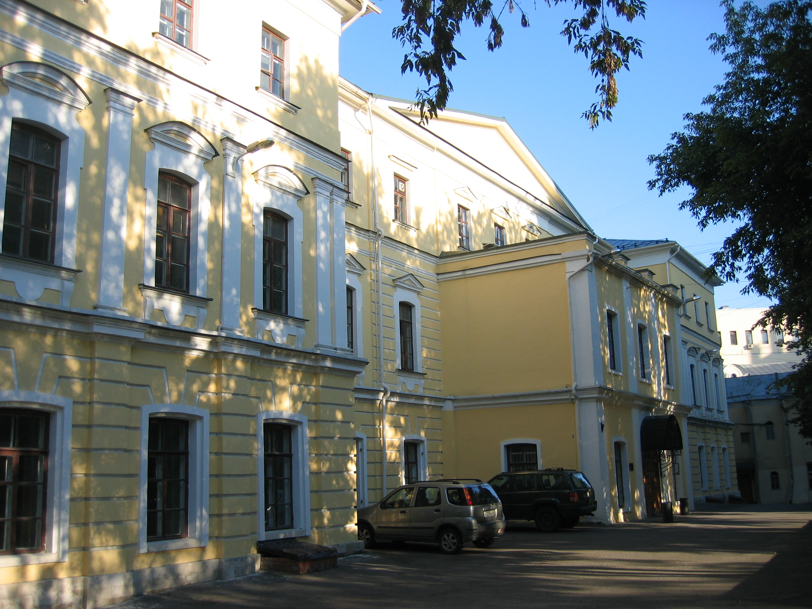 Das Gebäude der Russischen Akademie für Theaterkunst in Moskau